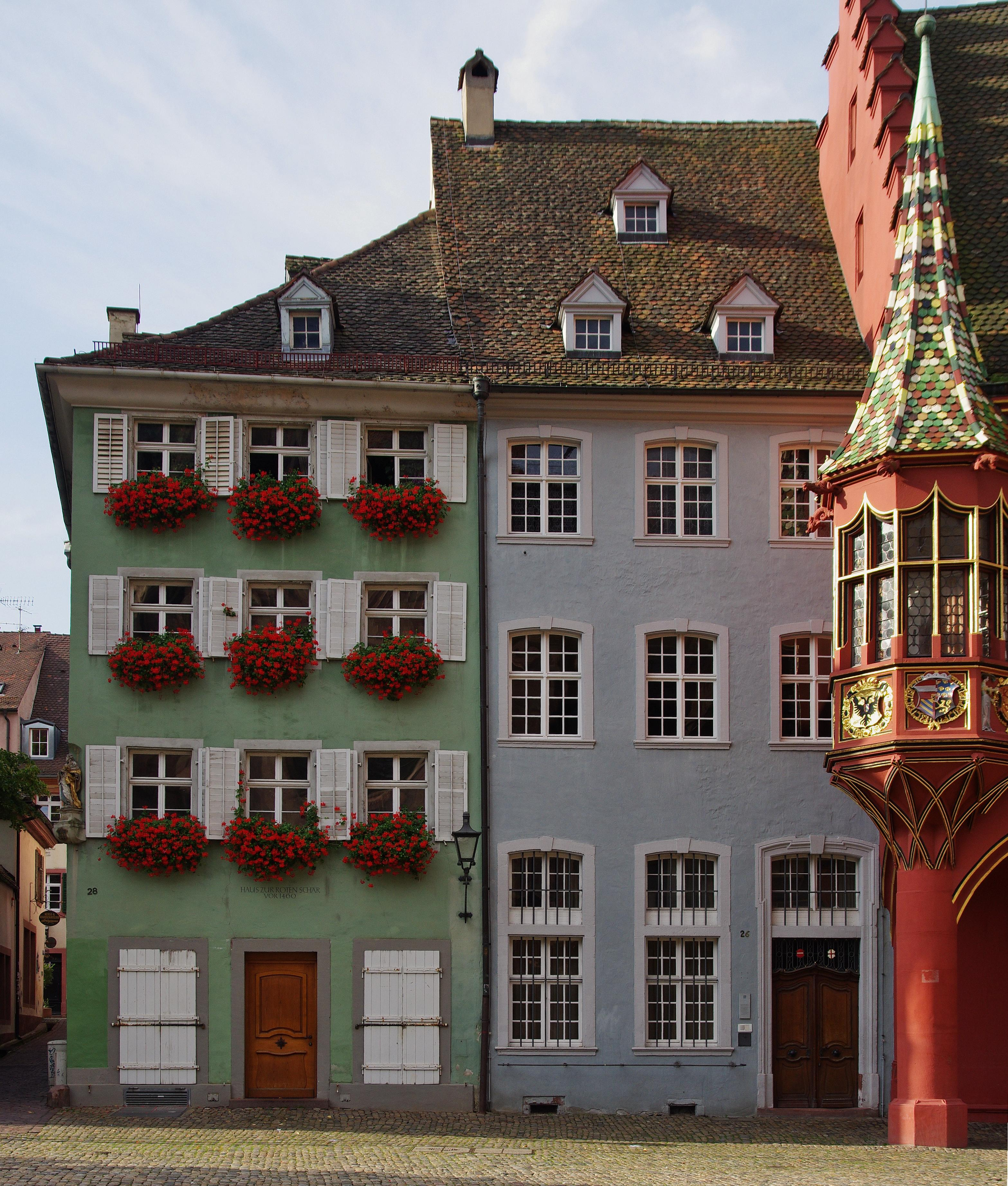 Das Redoutenhaus in Freiburg, Es war im Mittelalter das städtische Salzhaus. Hier ist auch 1878 die Stube nach dem Entwurf von Fritz Geiges für den Breisgau Geschichtsverein Schau-ins-Land eingebaut worden